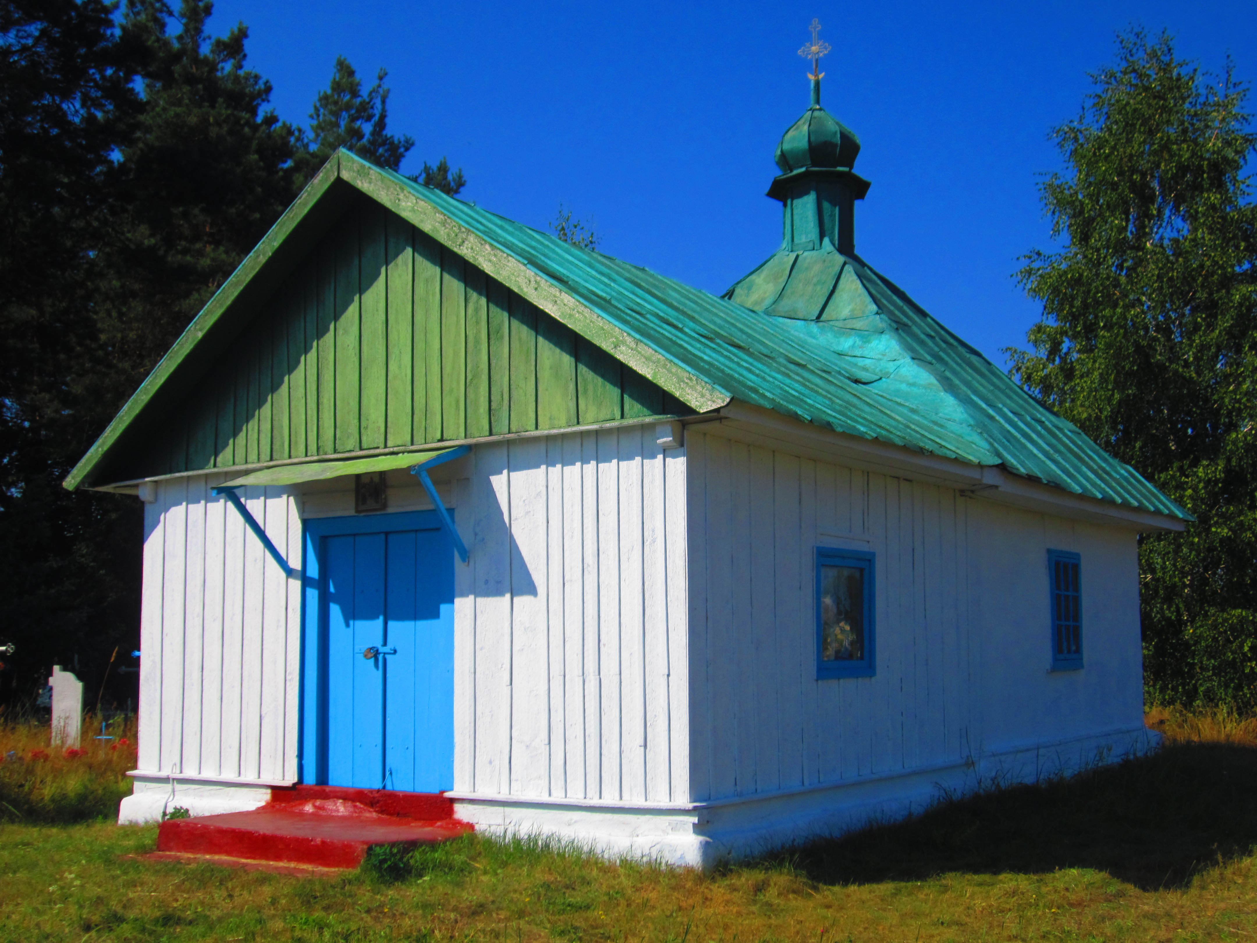 Дерев'яна церква Пресвятої Трійці в селі Варварівка (Барбарівка) Славутського району Хмельницької області. Загальний вигляд з позиції А4.